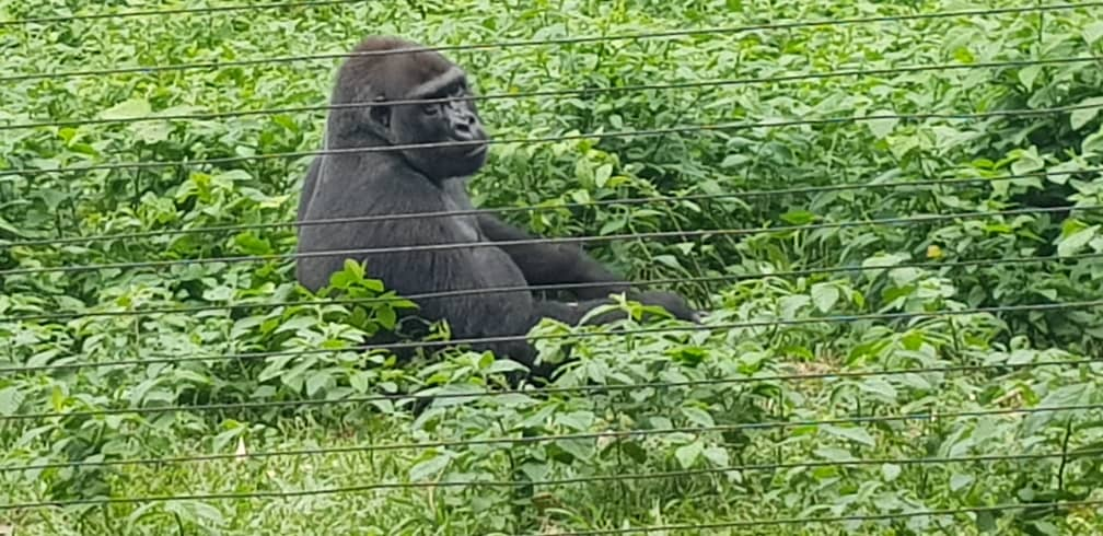 Mefou primate sanctuary